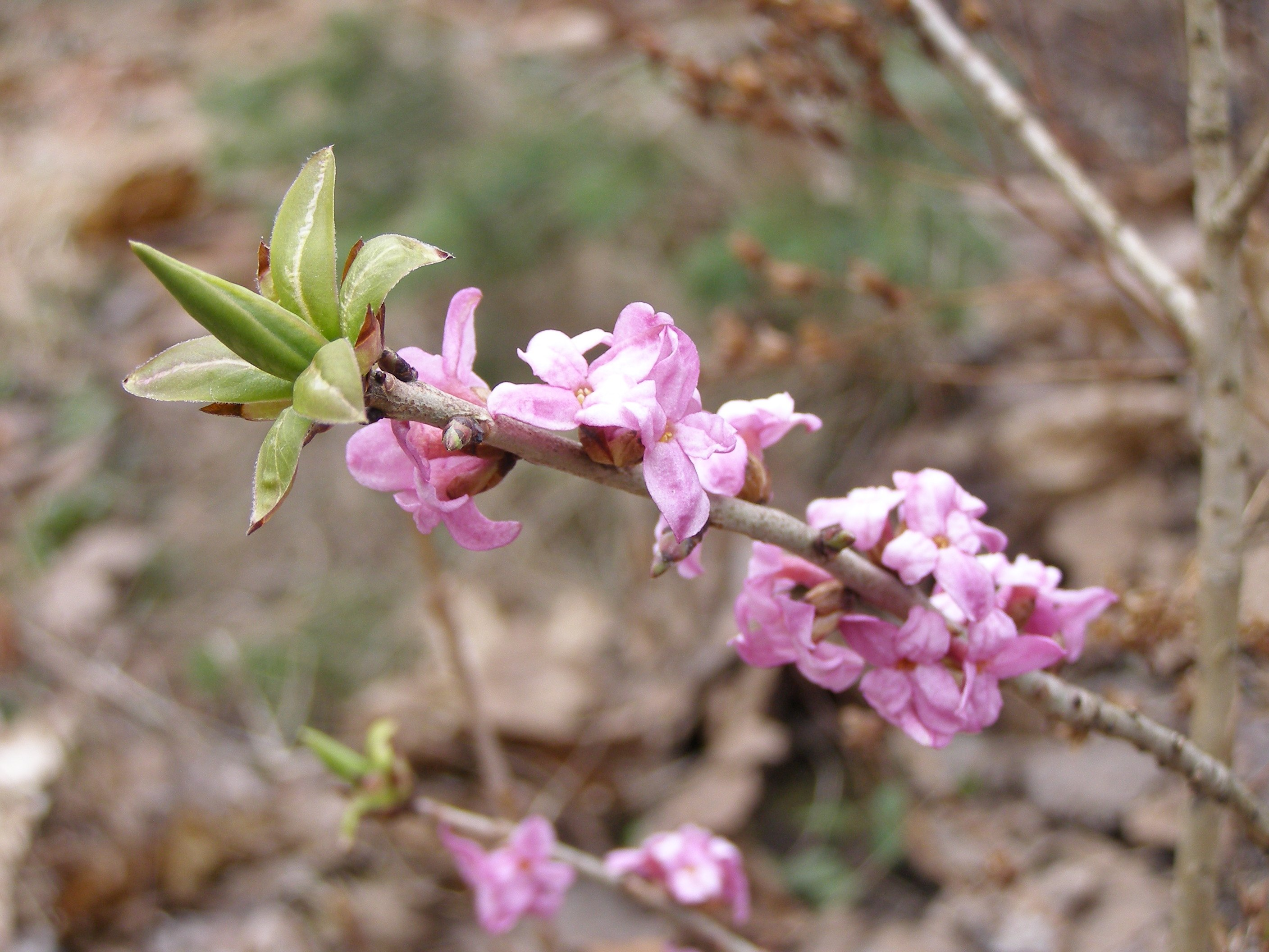 Harilik näsiniin (Daphne mezereum) Tartus